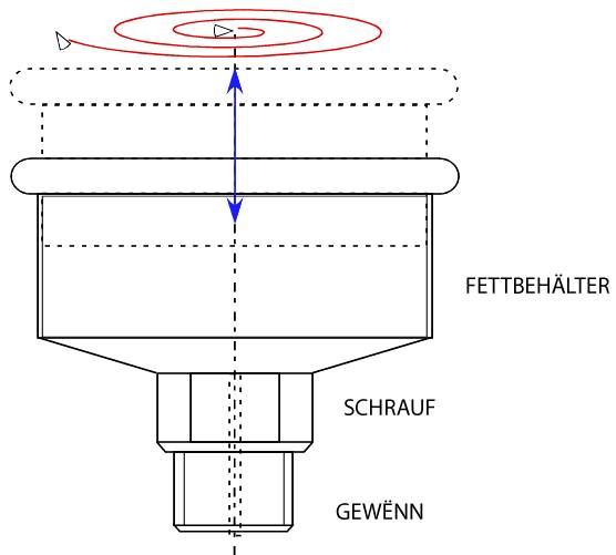 Staufferbécks Schema